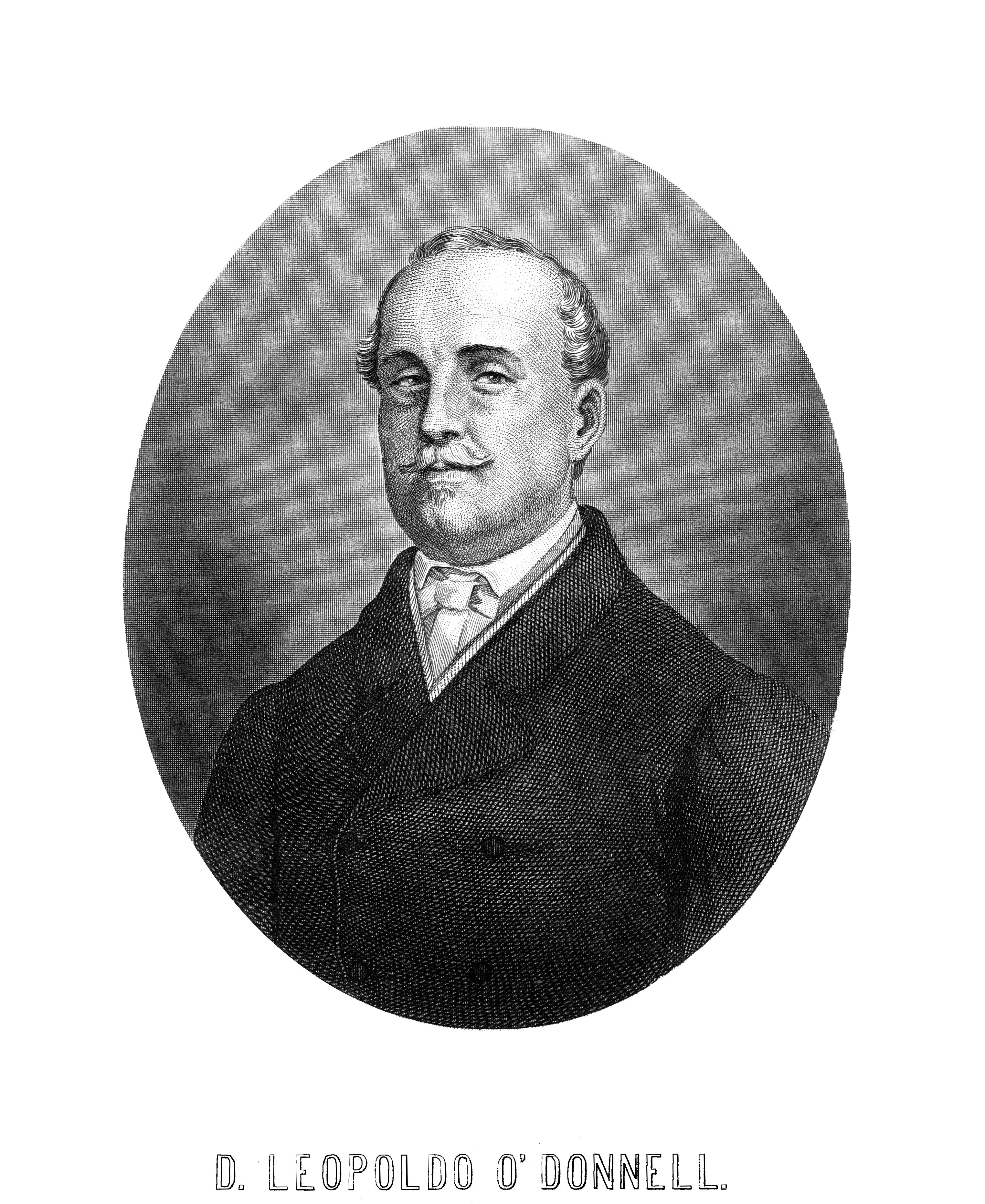 Leopoldo O'Donnell